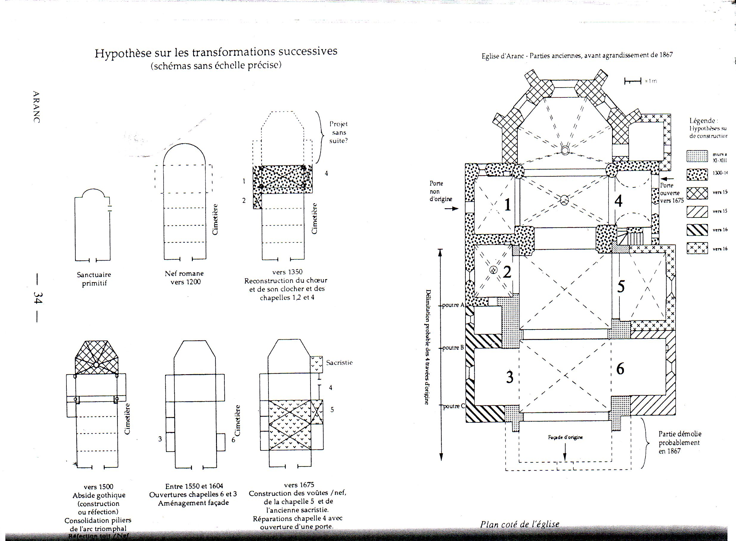 Plan de l'église d'aranc